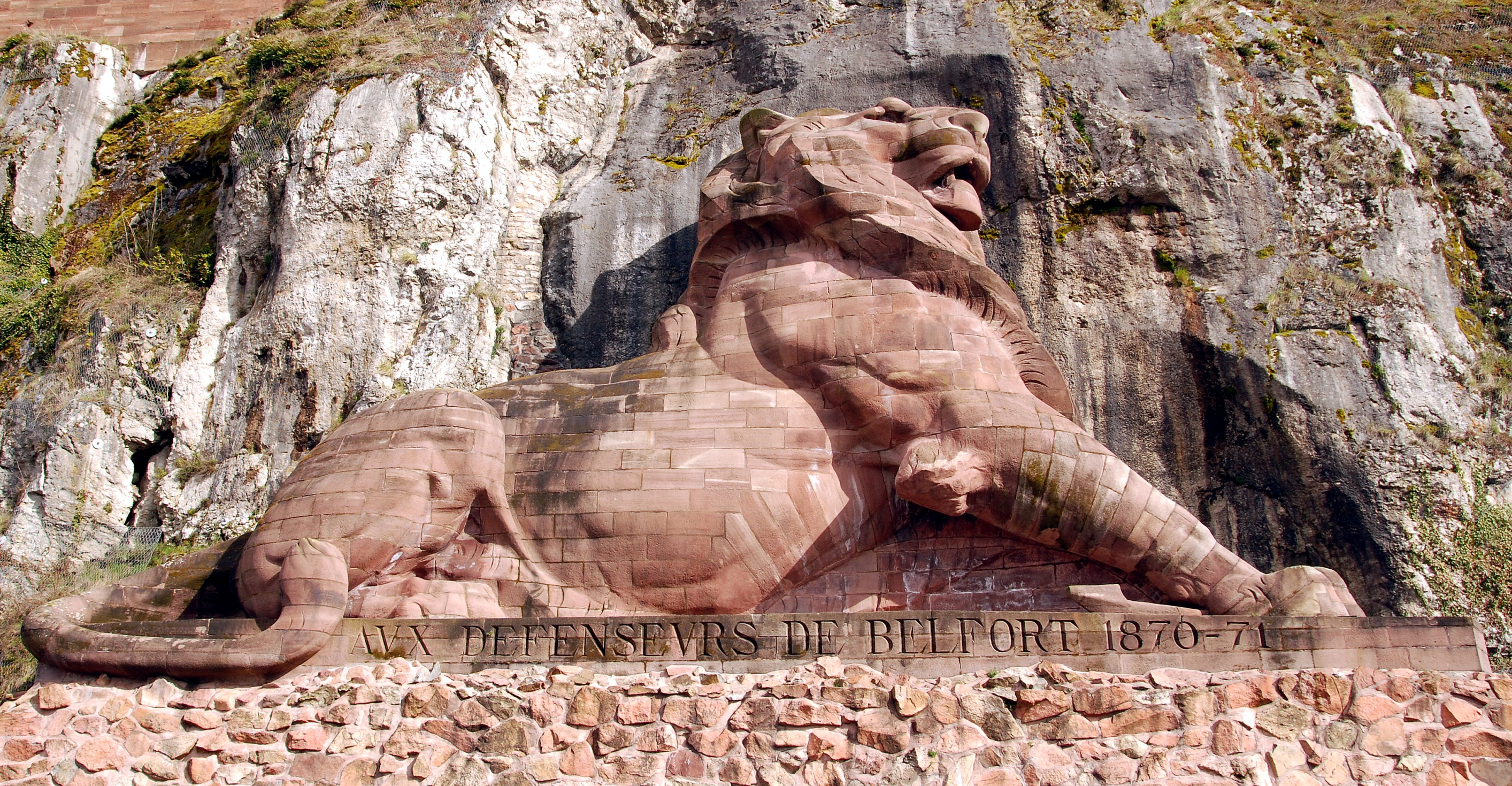 Löwe von Belfort, Frankreich